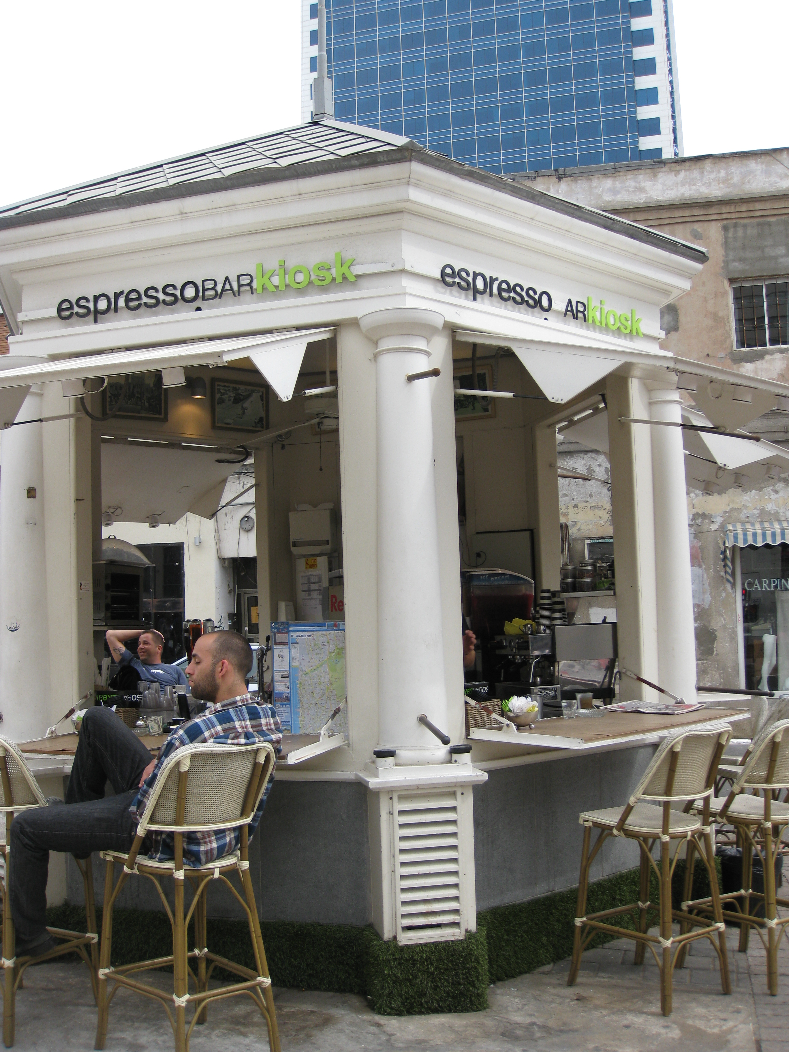 The first Kiosk of Tel Aviv הקיוסק הראשון של תל אביב